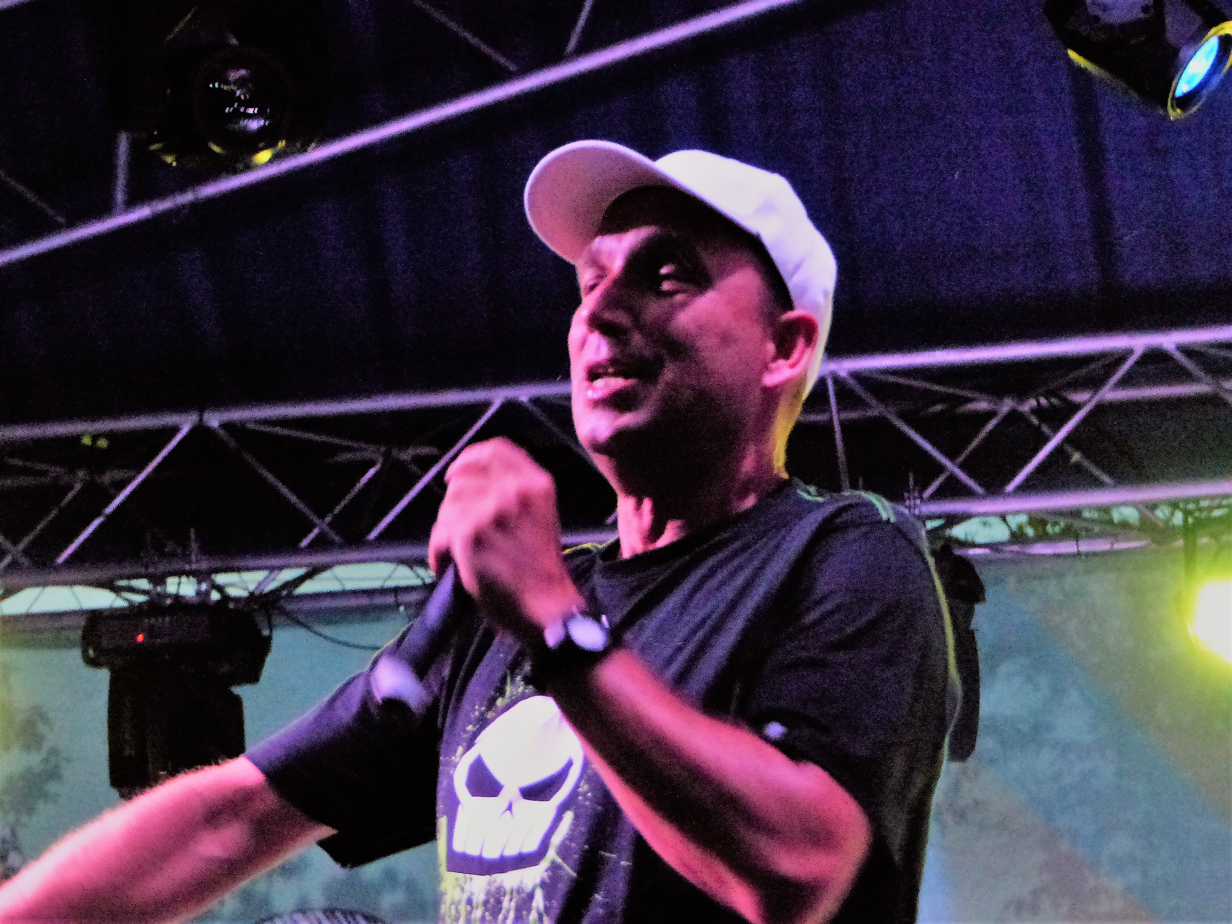 Ricsipí. Animal Cannibals - Qka – Koller László, Ricsipí - Dósa Richárd A felvétel 2017. június 29-én, csütörtökön készült Balatonkenesén. Először rendezték meg Balatonkenesén a Balaton fesztivált. A 2017. június 29 -től július 2-ig tartó fesztivál első napján hip-hop együttesek léptek fel - Sub Bass Moster, Animal Cannibals, Akkezdet Phiai. A második napon, 30-a, pénteken indie pop, rock fellépők: Queen's Land, Firkin, Lord, Reckless Roses. A harmadik nap fellépői: Groovehouse, UFO, Kozmix. A negyedik napon a Varnyú Country, a Mokka Tribute, a Republic és a Balkan Fanatik együttesek játszottak.